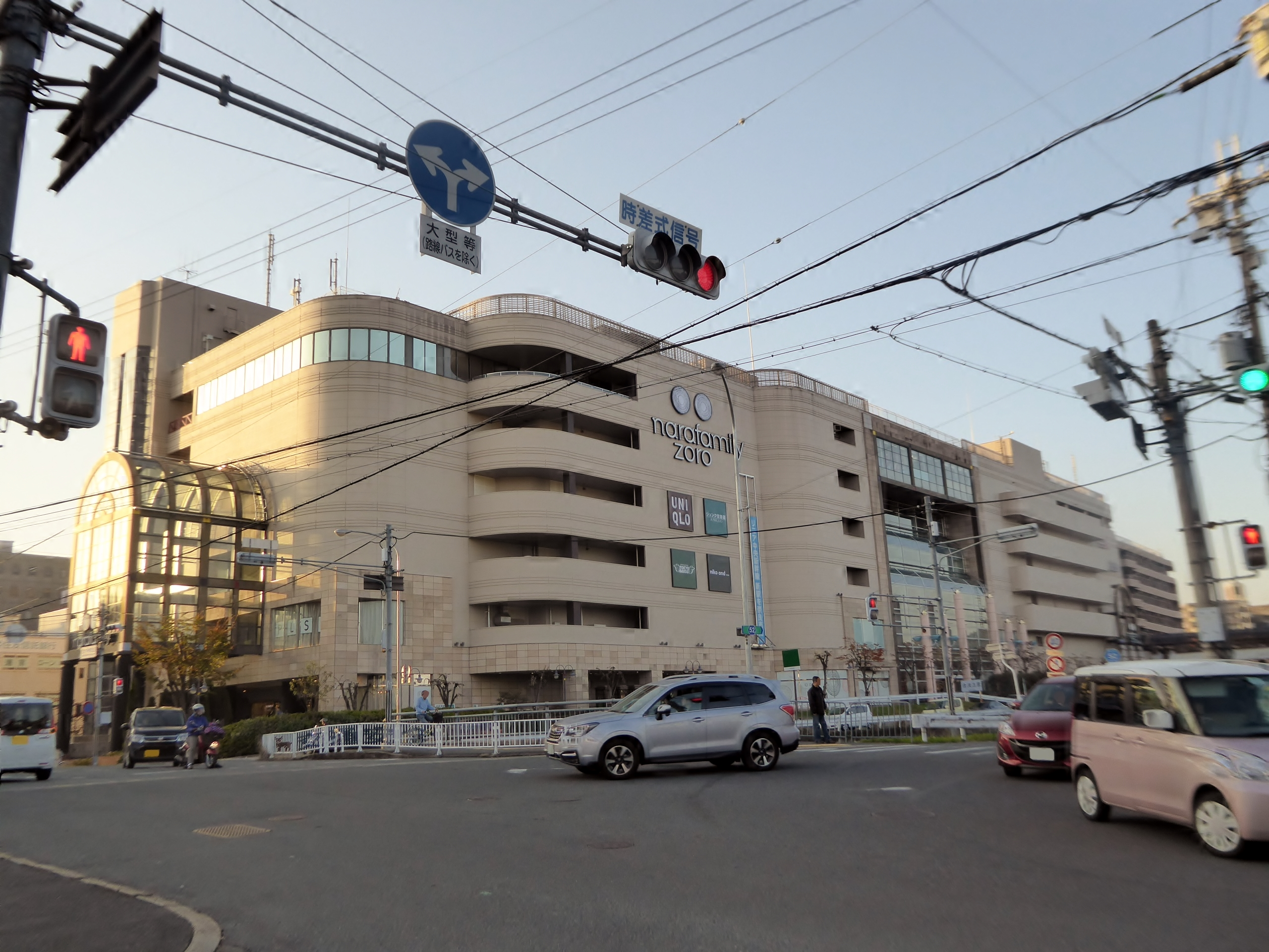 ならファミリーを撮影。